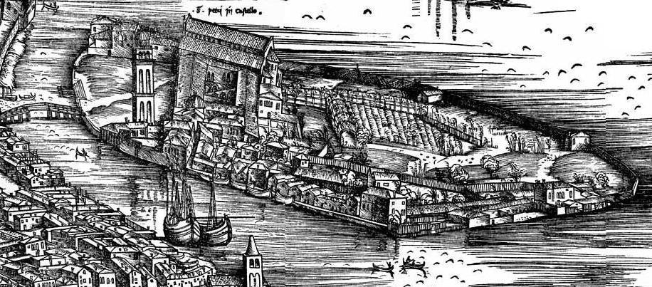 Isola di San Pietro di Castello